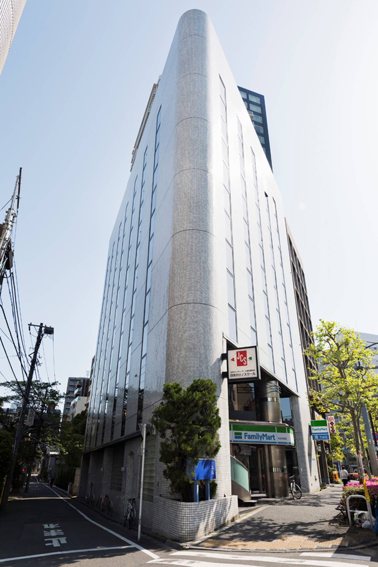 日本カジノスクール 東京校